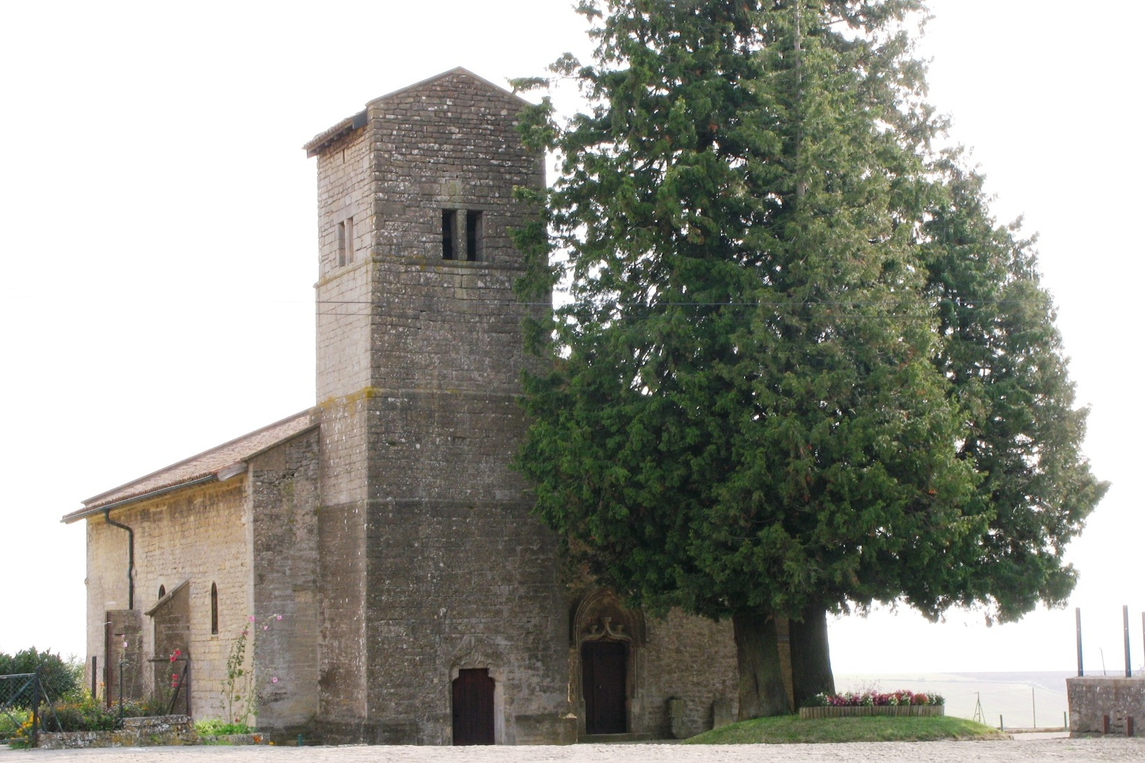 Église du XII - XIII à Mont-Bonvillers